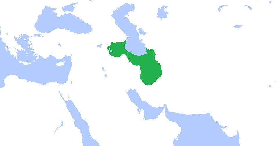 مازِرونی: وُشمگیر ِسامون